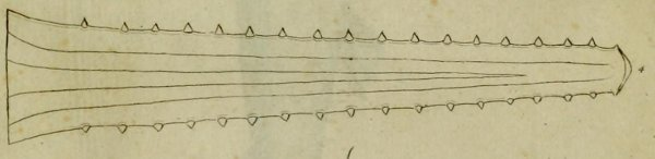 Рострум малозубого пилорыла